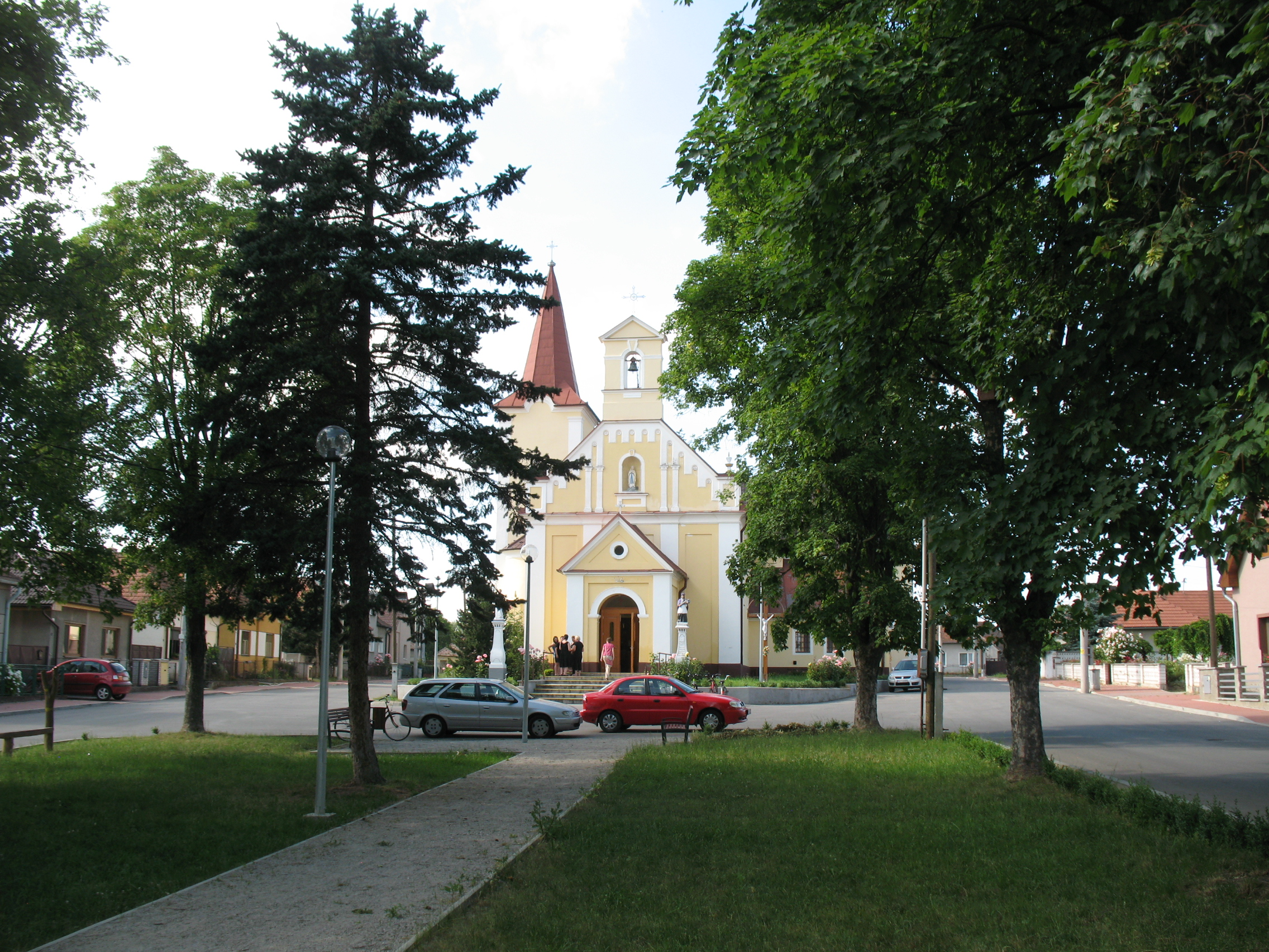 Ribény